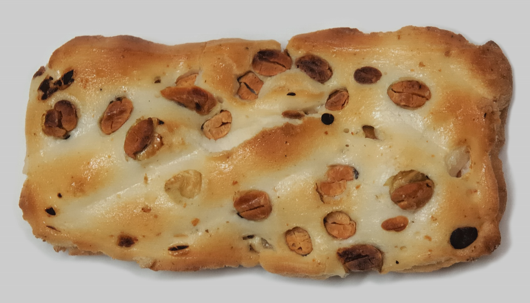 Beika (米菓、豆入り)